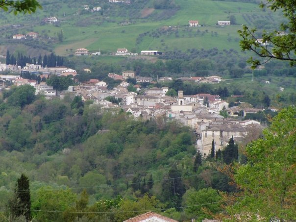 panorama del grande paese di Civitella Casanova, galleggiante ed immerso nel verde.